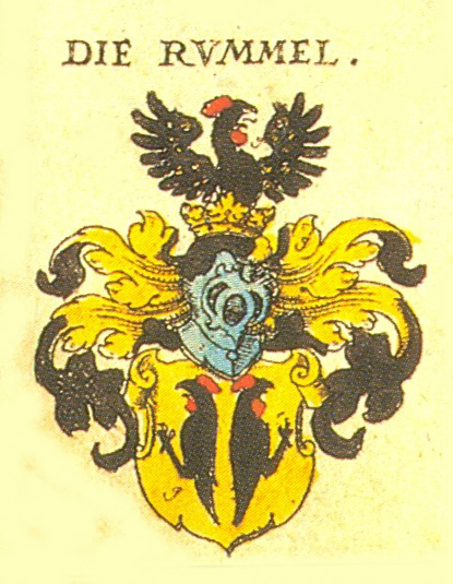 Wappen der Nürnberger Patrizierfamilie Rummel von Zant und Lonnerstadt